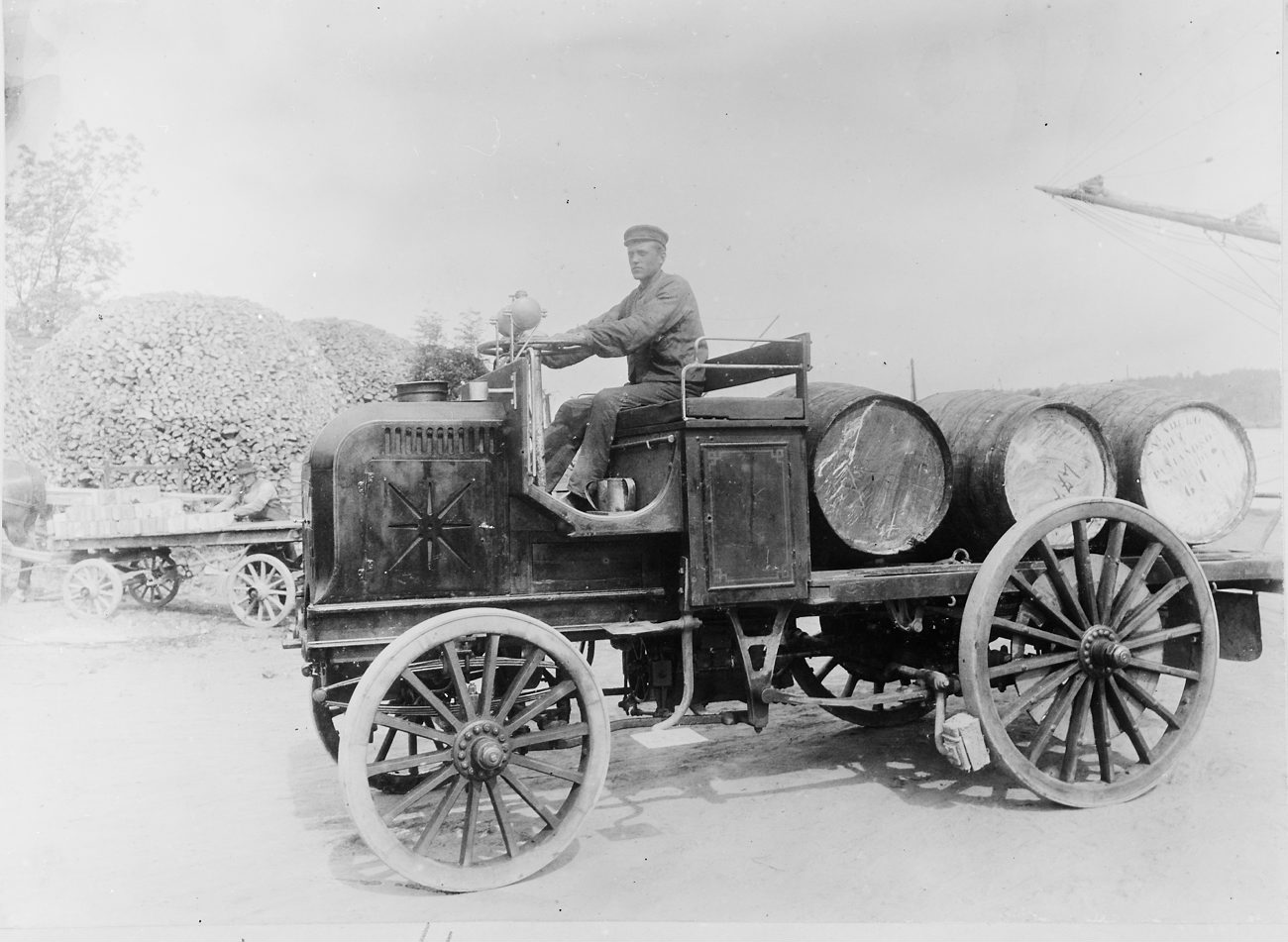 B17150 8 hkr 2 cyl Daimler-Lastvagn för 2500 kg belastning levererad till Liljeholmens Stearinfabrik, Stockholm 1898. Även kallad för "Bullerbussen". Daimler truck for 2500 kilos. Fabricated for the stearin fabric Liljeholmens in Stockholm 1898. So called "The Noise Car". Photo: Okänd/ Unknown